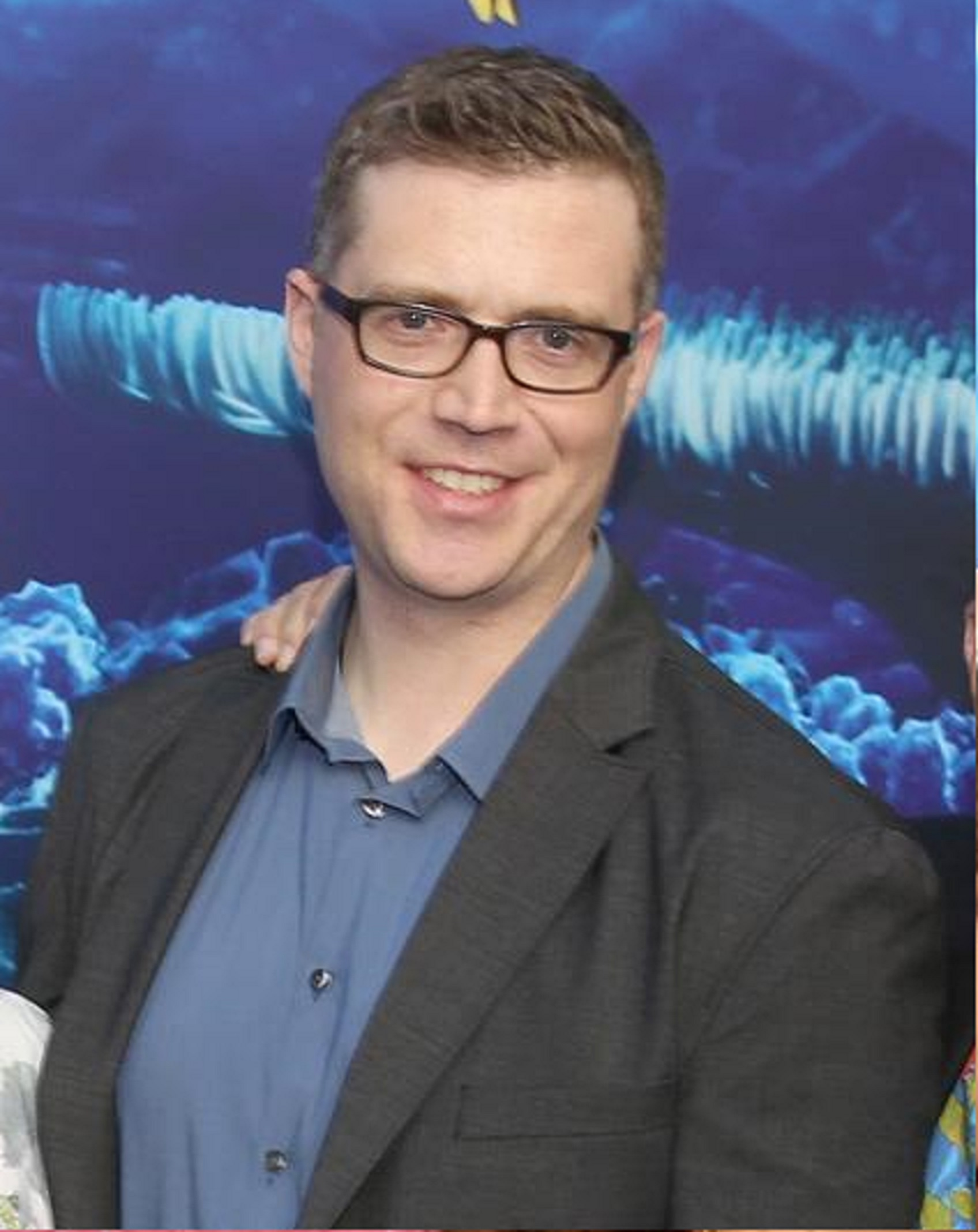 Angus Maclane en la premiere de Buscando a Dory